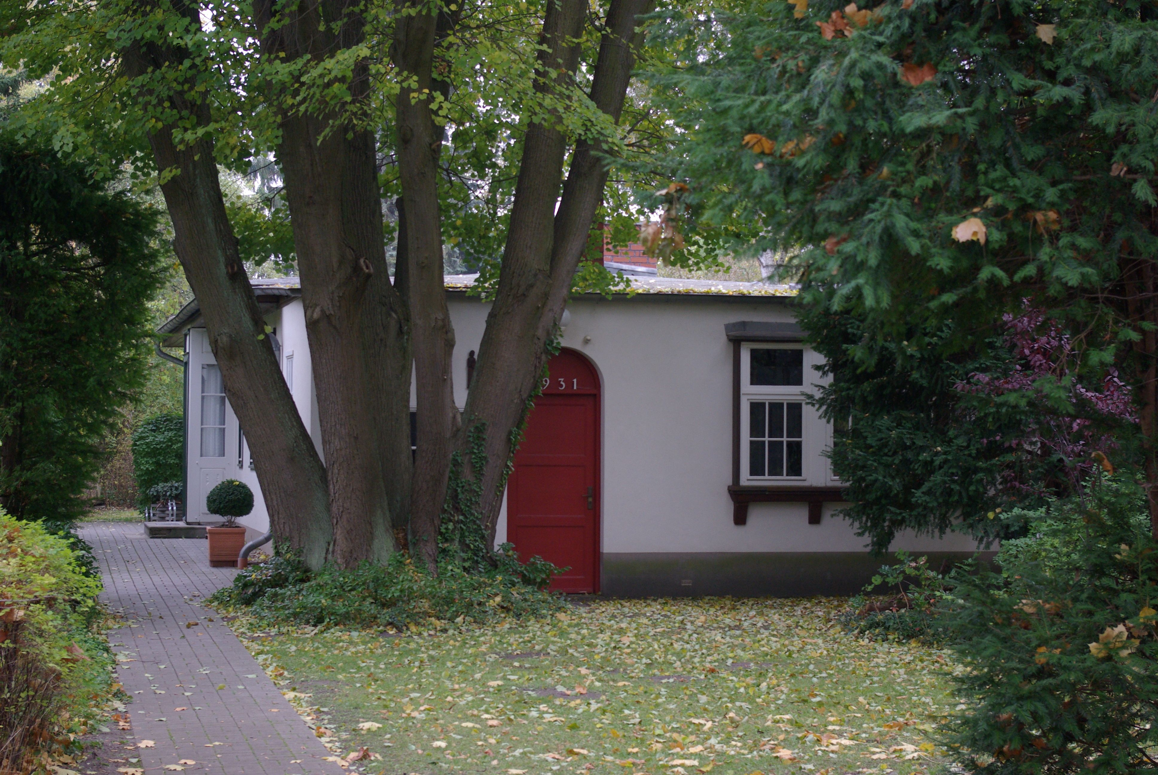 Brieselang in Brandenburg. Das Haus von Hans Klakow war sein Atelier in Brieselang. Das Haus steht unter Denkmalschutz.